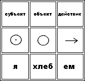 таблица порядка слов СОВ